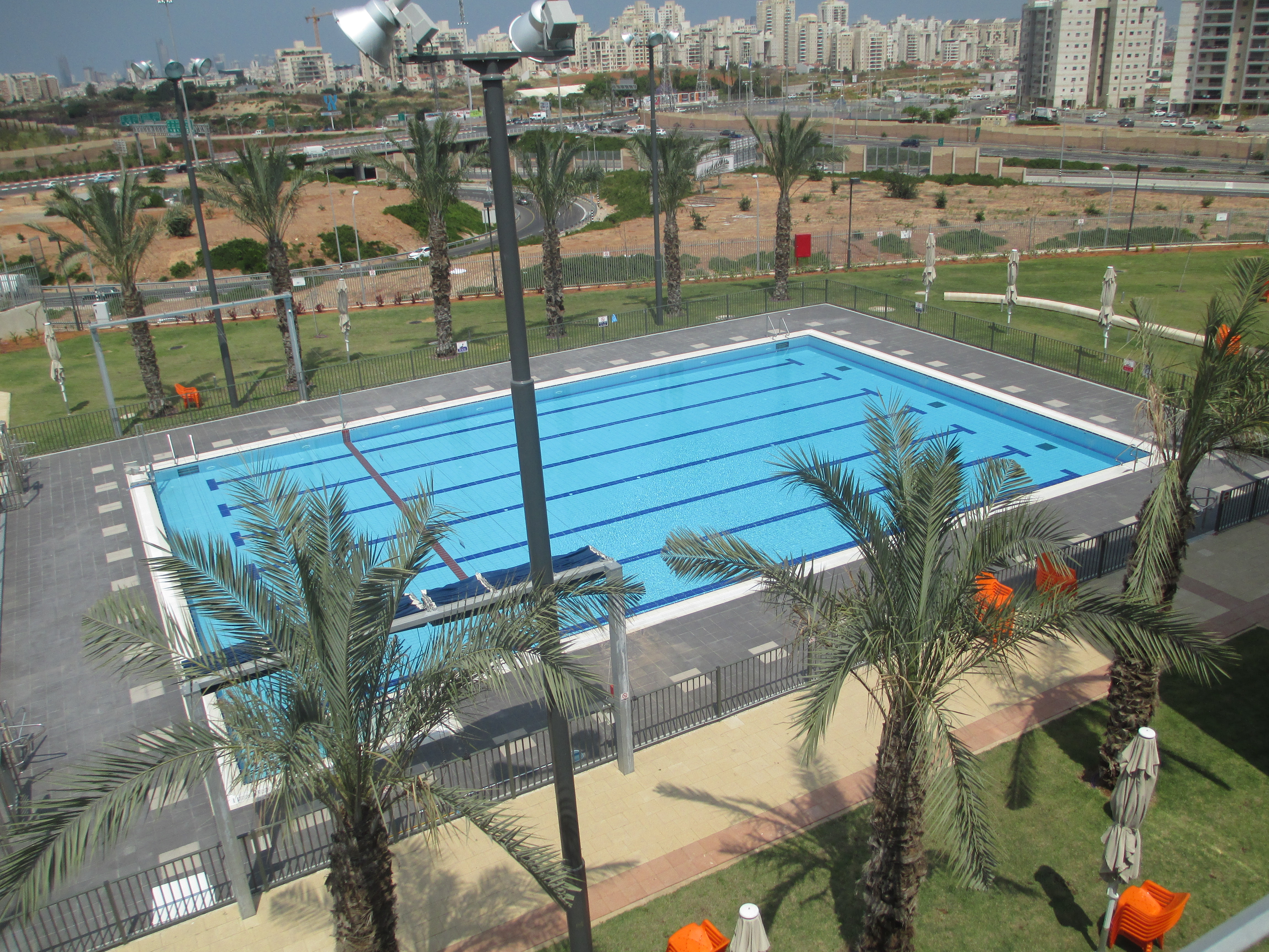 הבריכה בקאנטרי קלאב בקריית אונו